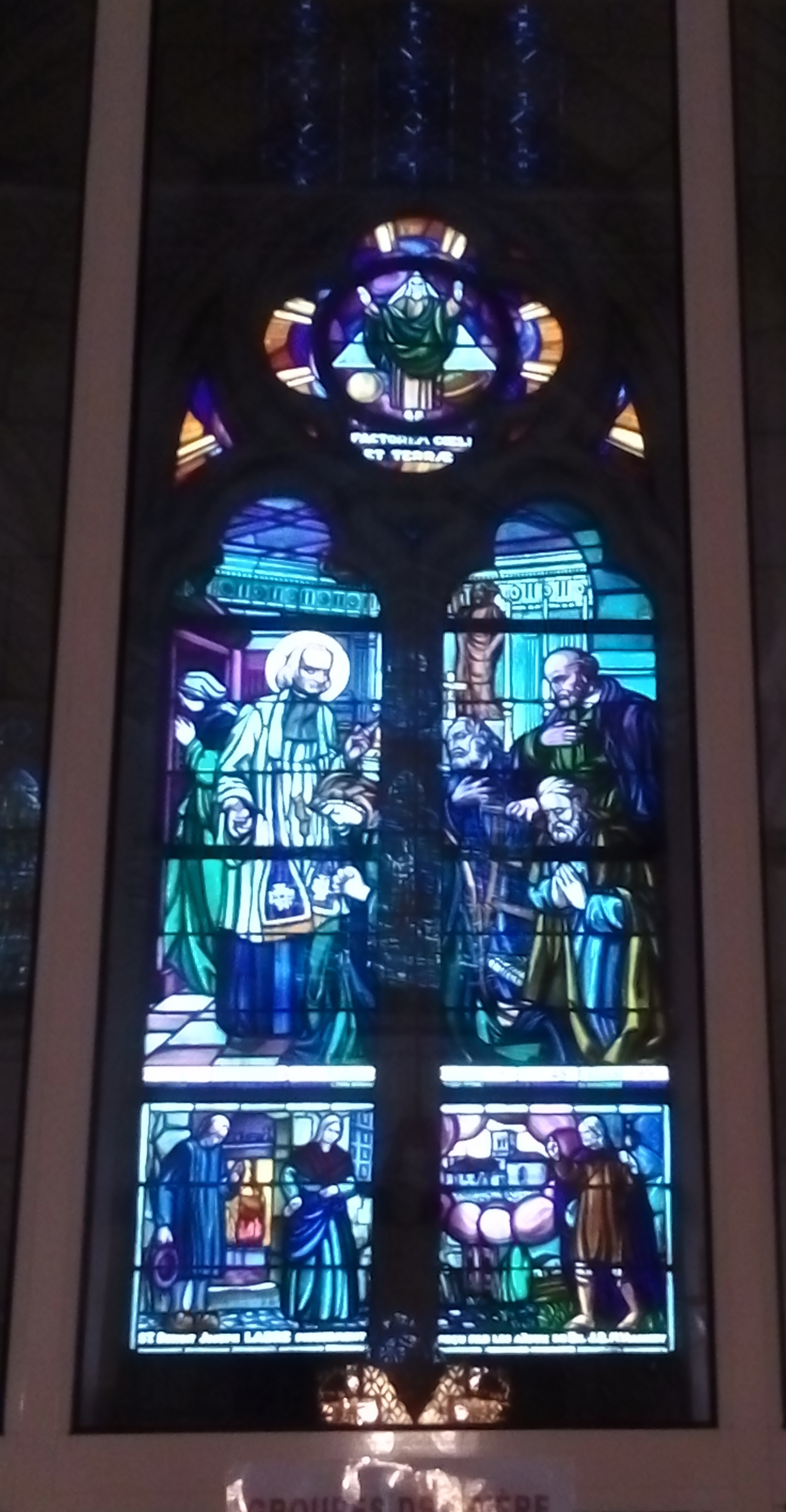 Basilique ND de Montligeon - Vitrail du Saint Curé d'Ars